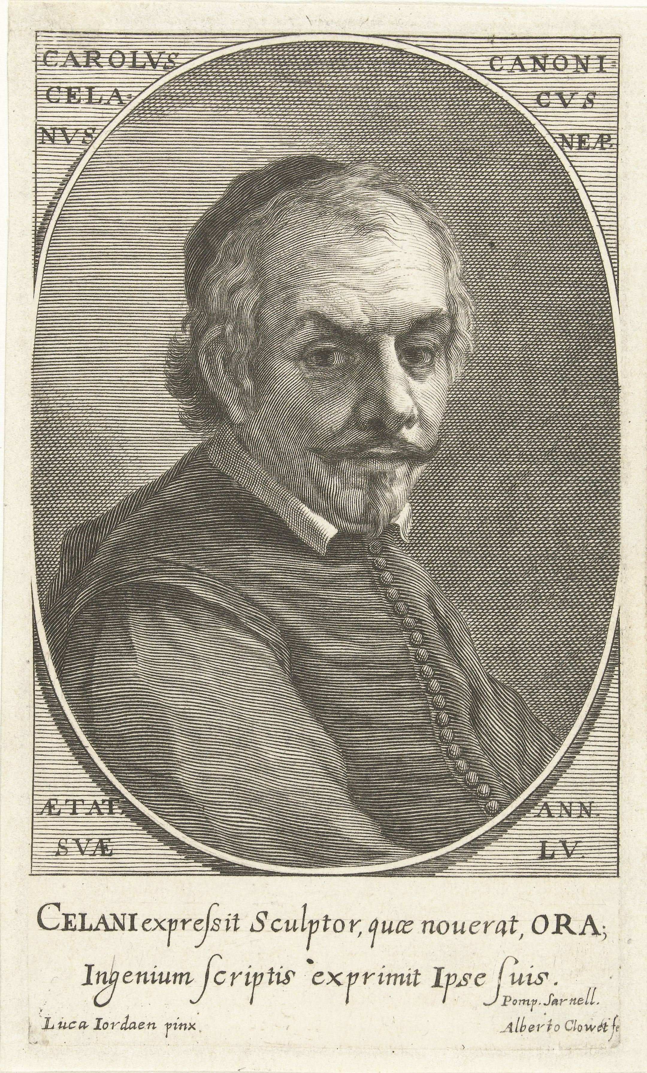 IdentificatieTitel(s): Portret van Carolus CelanusObjecttype: prent Objectnummer: RP-P-1882-A-5950Catalogusreferentie: LeBlanc 15Opschriften / Merken: verzamelaarsmerk, verso midden onder, gestempeld: Lugt 2228Omschrijving: Portret in ovale lijst van Carolus Celanus. Buste naar rechts. De prent heeft een Latijns onderschrift met gegevens over de geportretteerde.VervaardigingVervaardiger: prentmaker: Albertus Clouwet (vermeld op object)naar schilderij van: Luca Giordano (vermeld op object)Plaats vervaardiging: prentmaker: Romenaar schilderij van: NapelsDatering: 1646 - 1679Fysieke kenmerken: gravureMateriaal: papier Techniek: graveren (drukprocedé)Afmetingen: blad: h 128 mm × b 75 mmOnderwerpWie: Carolus CelanusVerwerving en rechtenVerwerving: aankoop 1882Copyright: Publiek domein